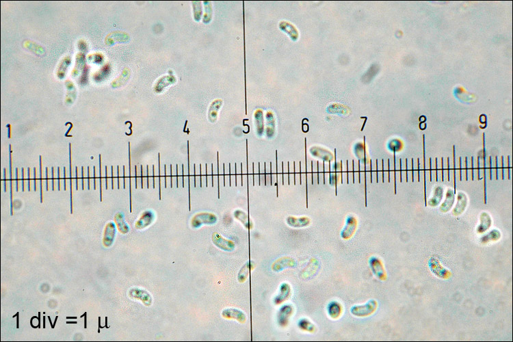 Phlebia tremellosa (Schrad.) Nakasone & Burds.